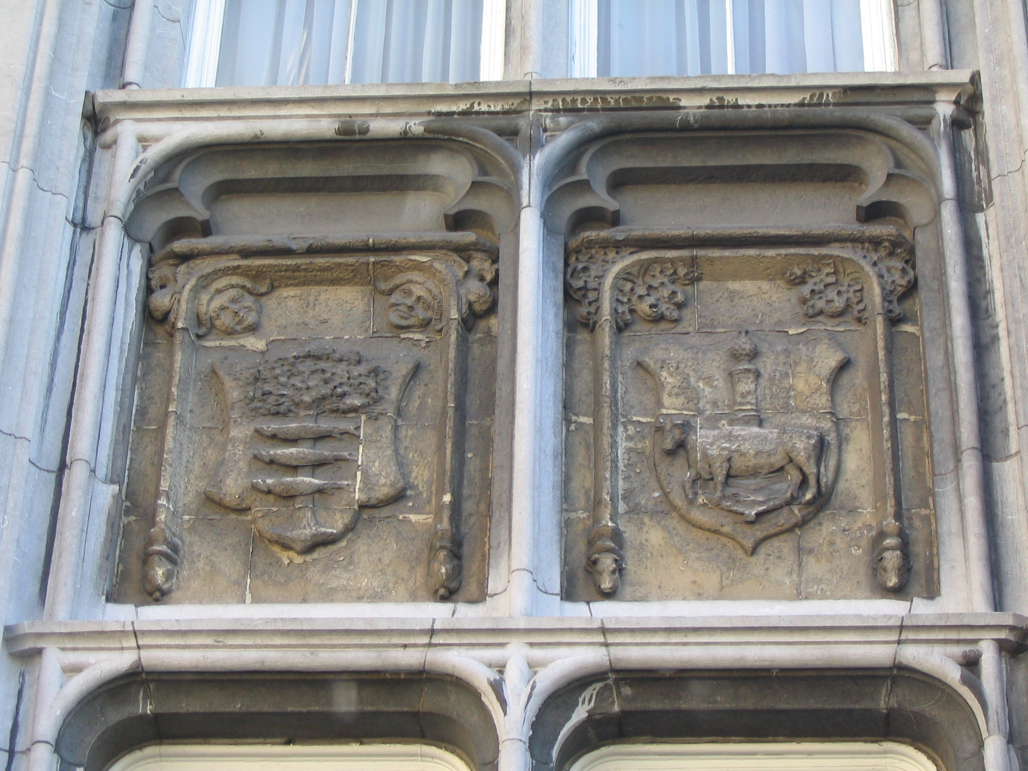 Panneau représentant deux des Trente-deux métiers de Liège sur la façade néogothique du Palais des Princes-Évêques de Liège : les 'fruitiers et harengiers' et les 'mangons'.